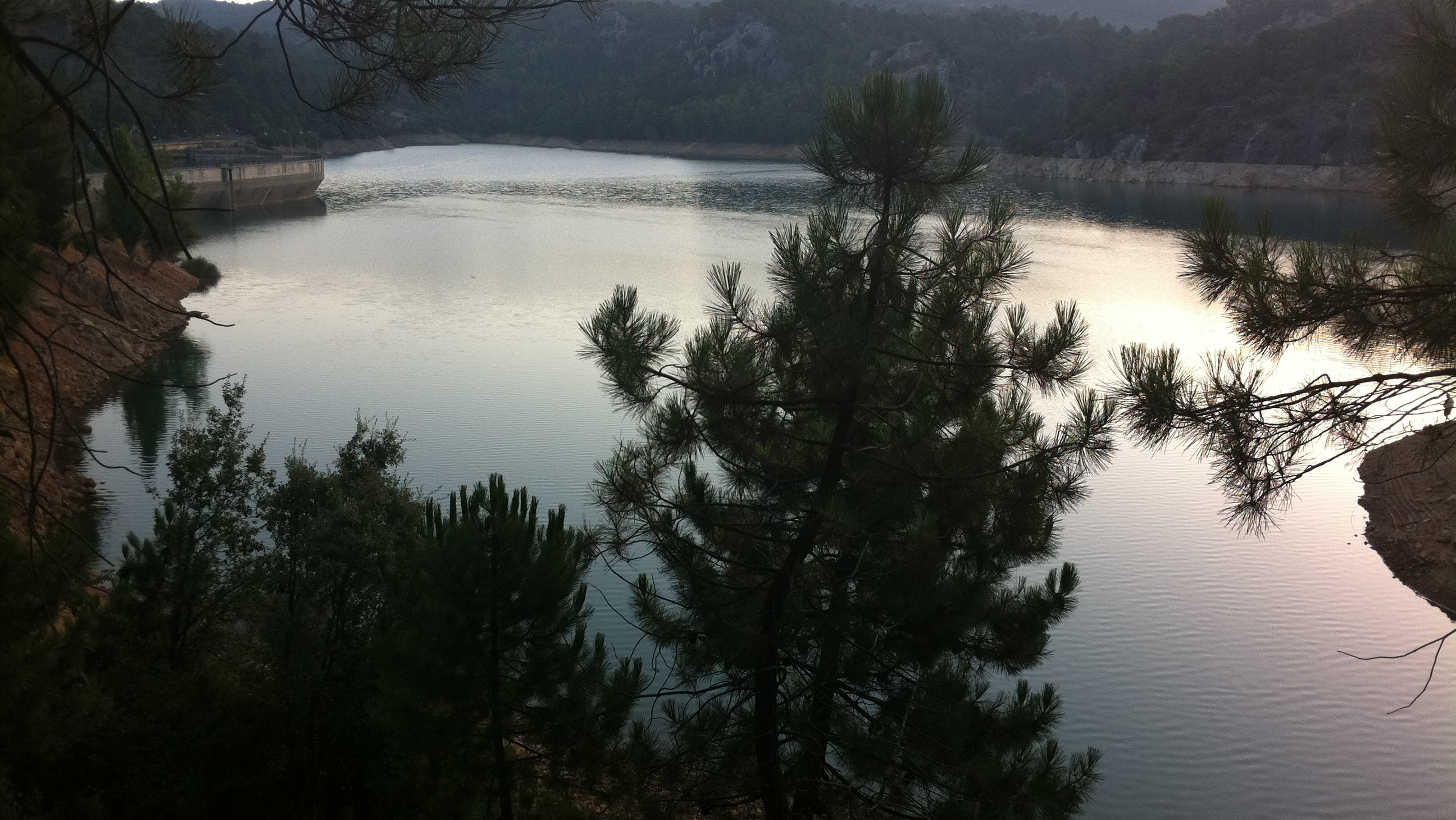 Vista del embalse de Aguascebas.